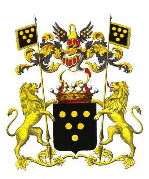 Wapenschild Huis de Vicq